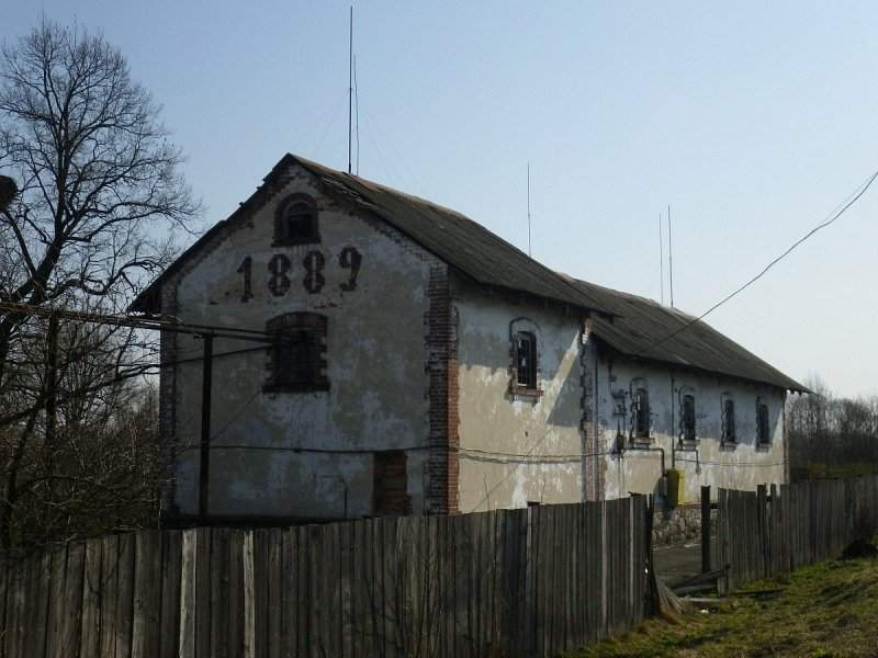 Завалочыцы. Сядзіба Жылінскіх